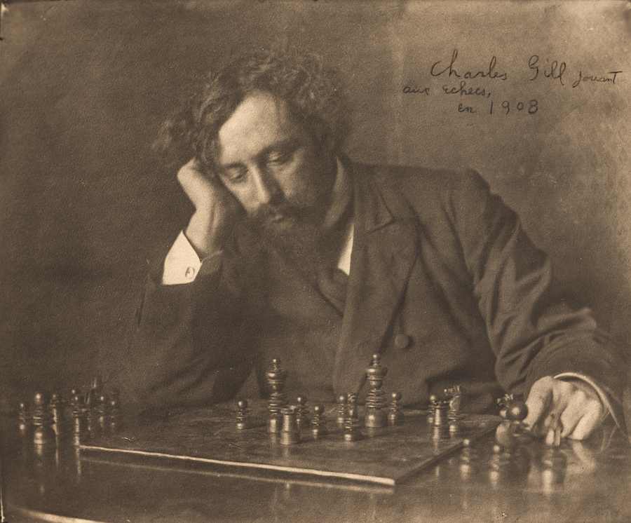 Charles Gill, peintre, auteur et membre de l’École littéraire de Montréal, jouant aux échecs, 1908.